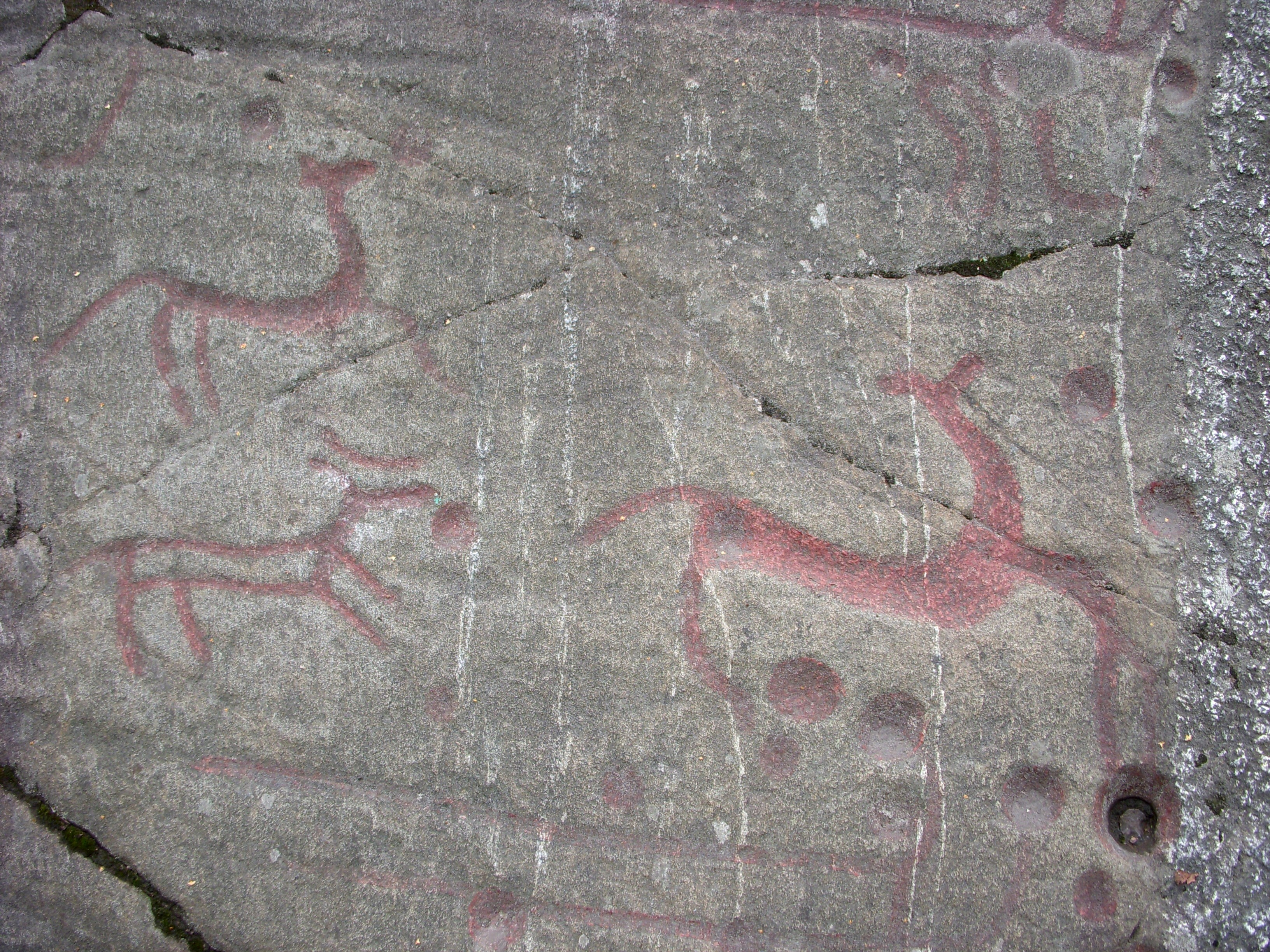 Slagstaristningen i Botkyrka, södra Stockholm, djurfigur